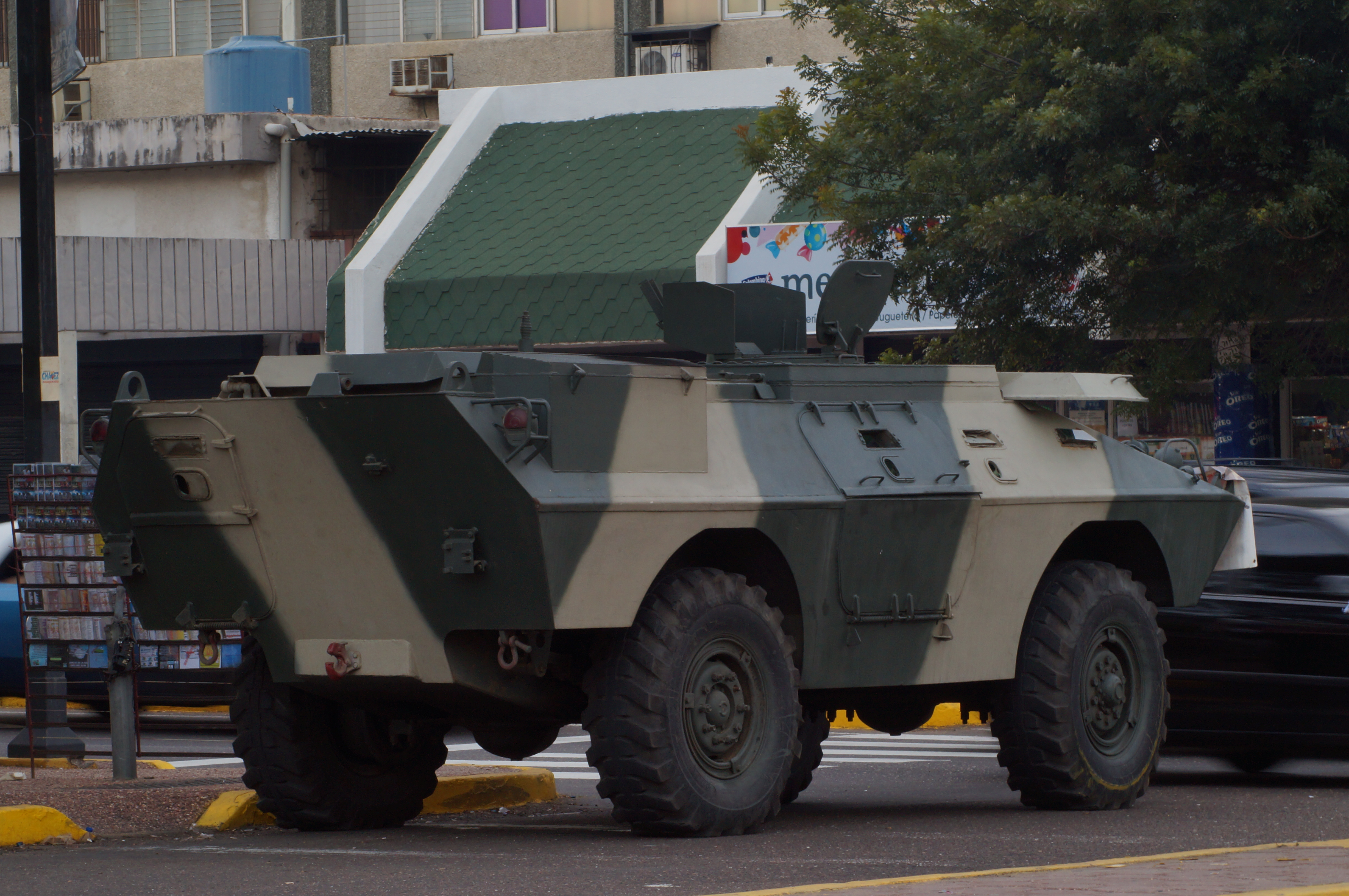 Tanqueta militar Dragoon 300